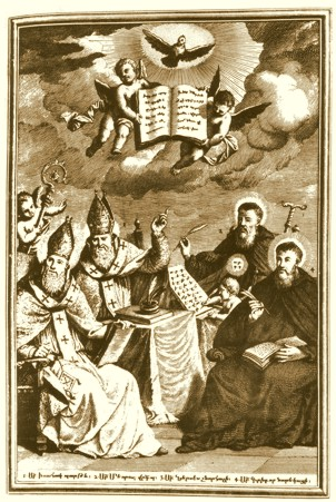 Месроп Маштоц и католикос Саак